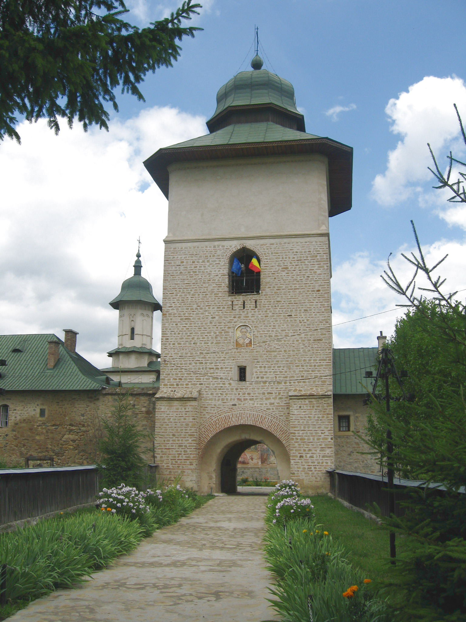 Mănăstirea Râşca 02